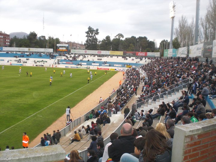 Foto de la nova Creu Alta en un partido del CE Sabadell.